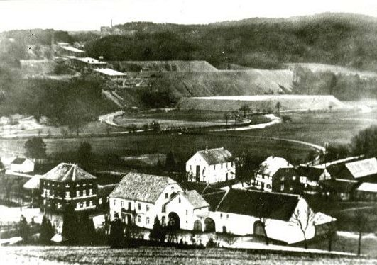 Eschbacher Mühle um 1905, im Hintergrund der Lüderich.